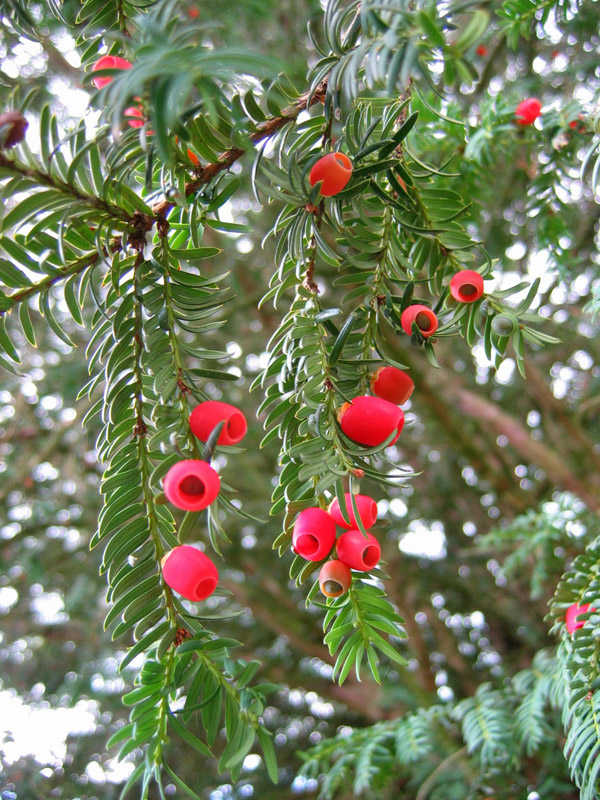 Taxus baccata, If commun, France (Gers)